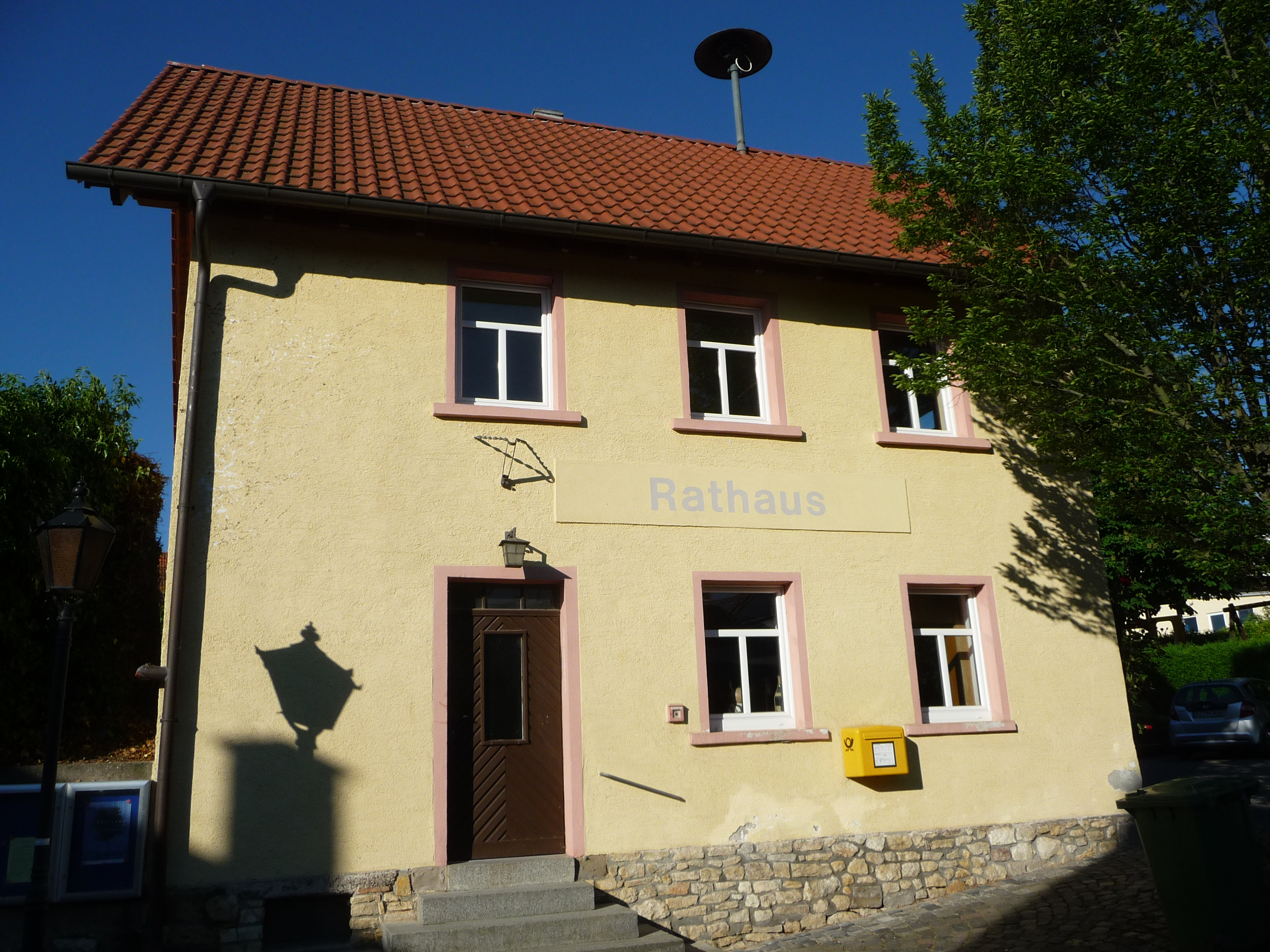 Hangen-Weisheim ist eine Ortsgemeinde im Landkreis Alzey-Worms in Rheinland-Pfalz.